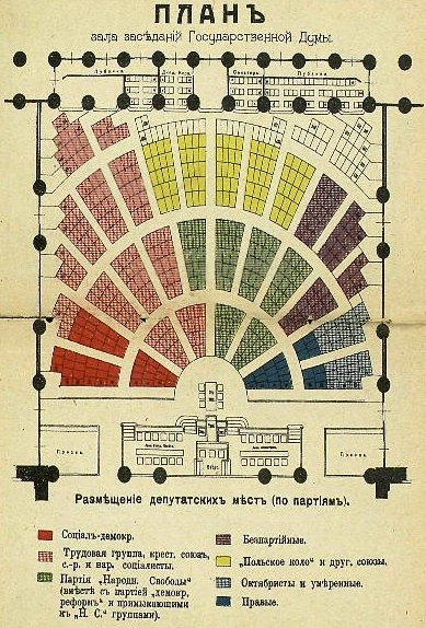 План заседаний Государственной думы Российской империи второго созыва